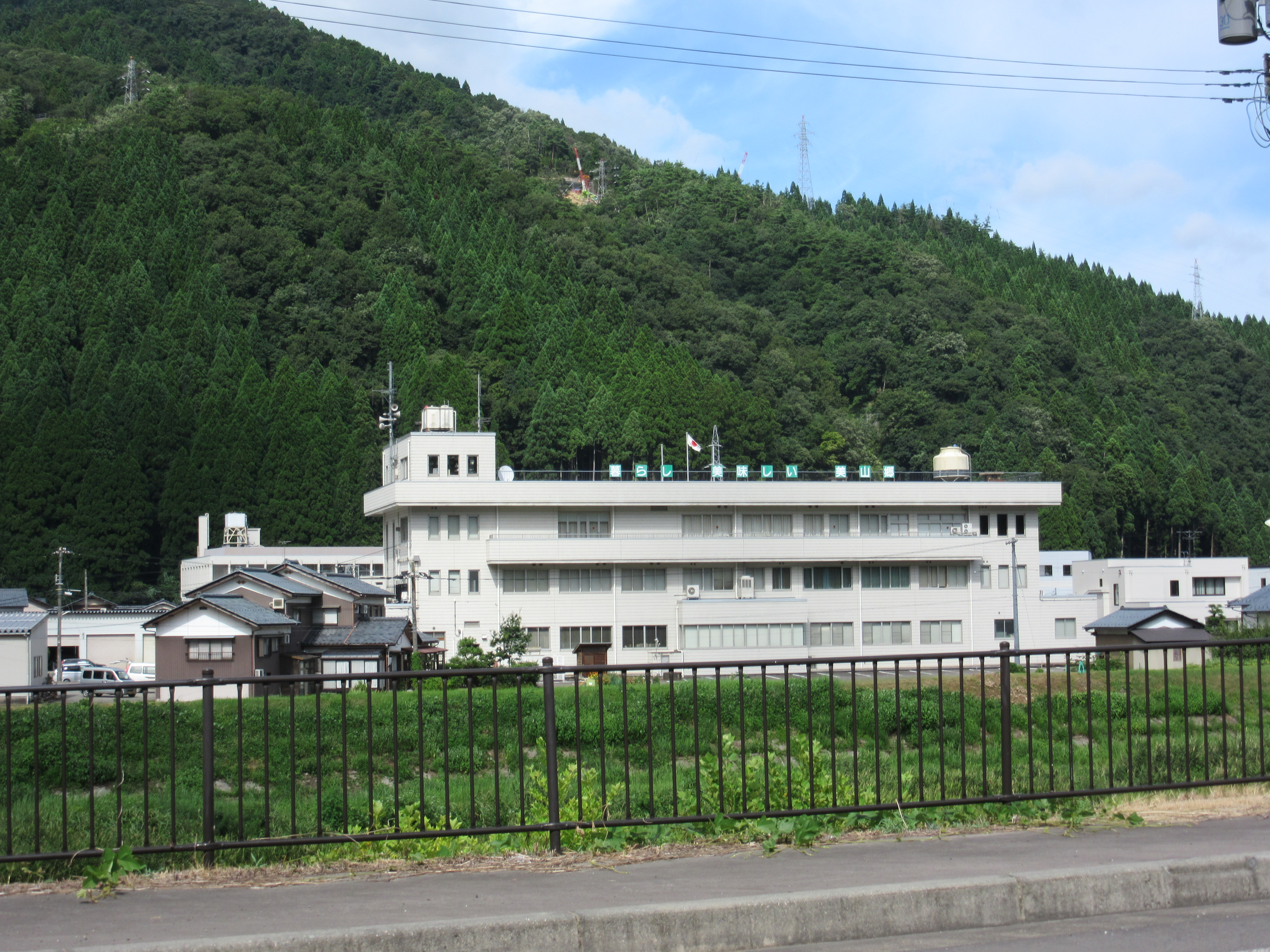 旧福井県美山町役場